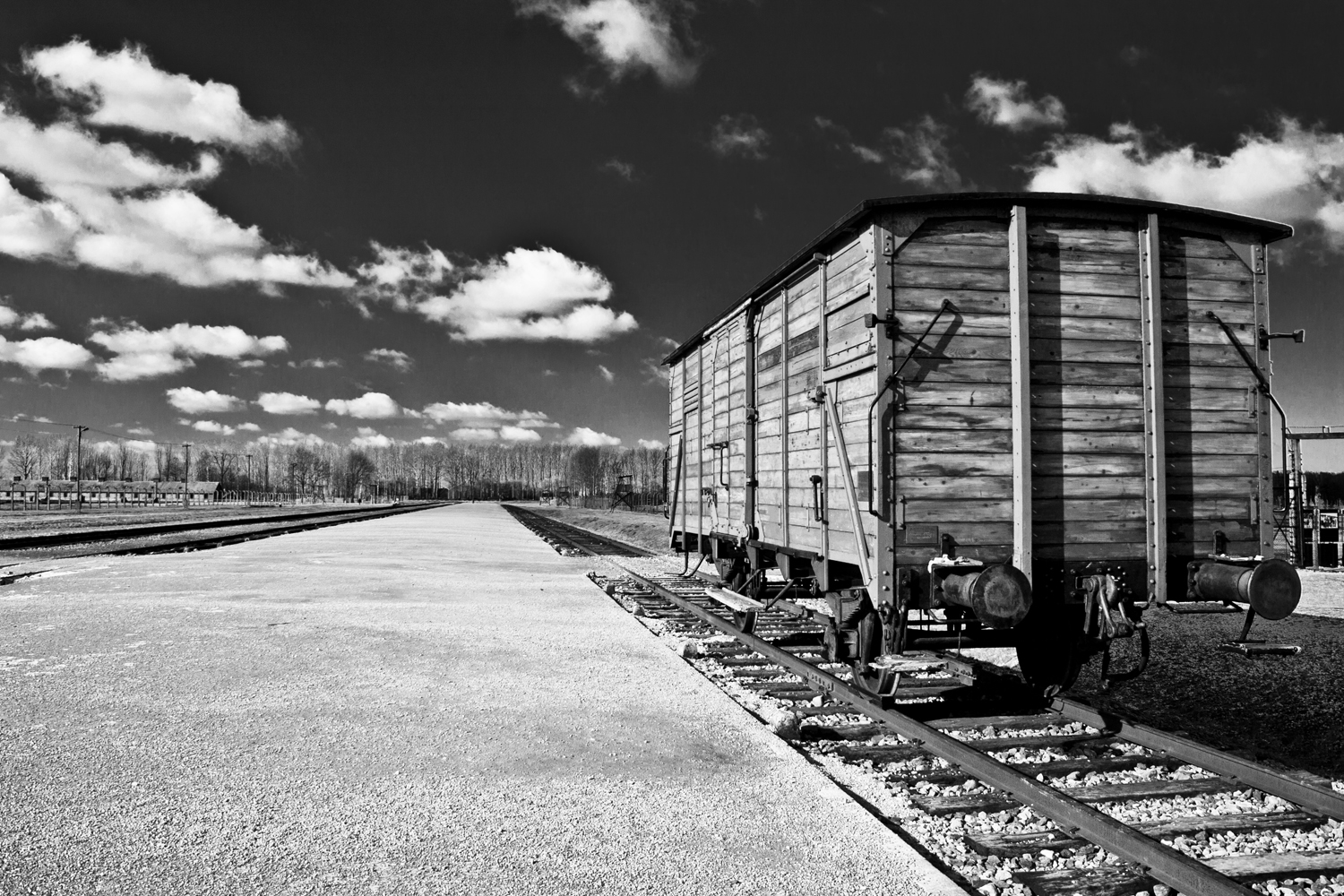 Wagon w obozie koncentracyjnym "Auschwitz-Birkenau".